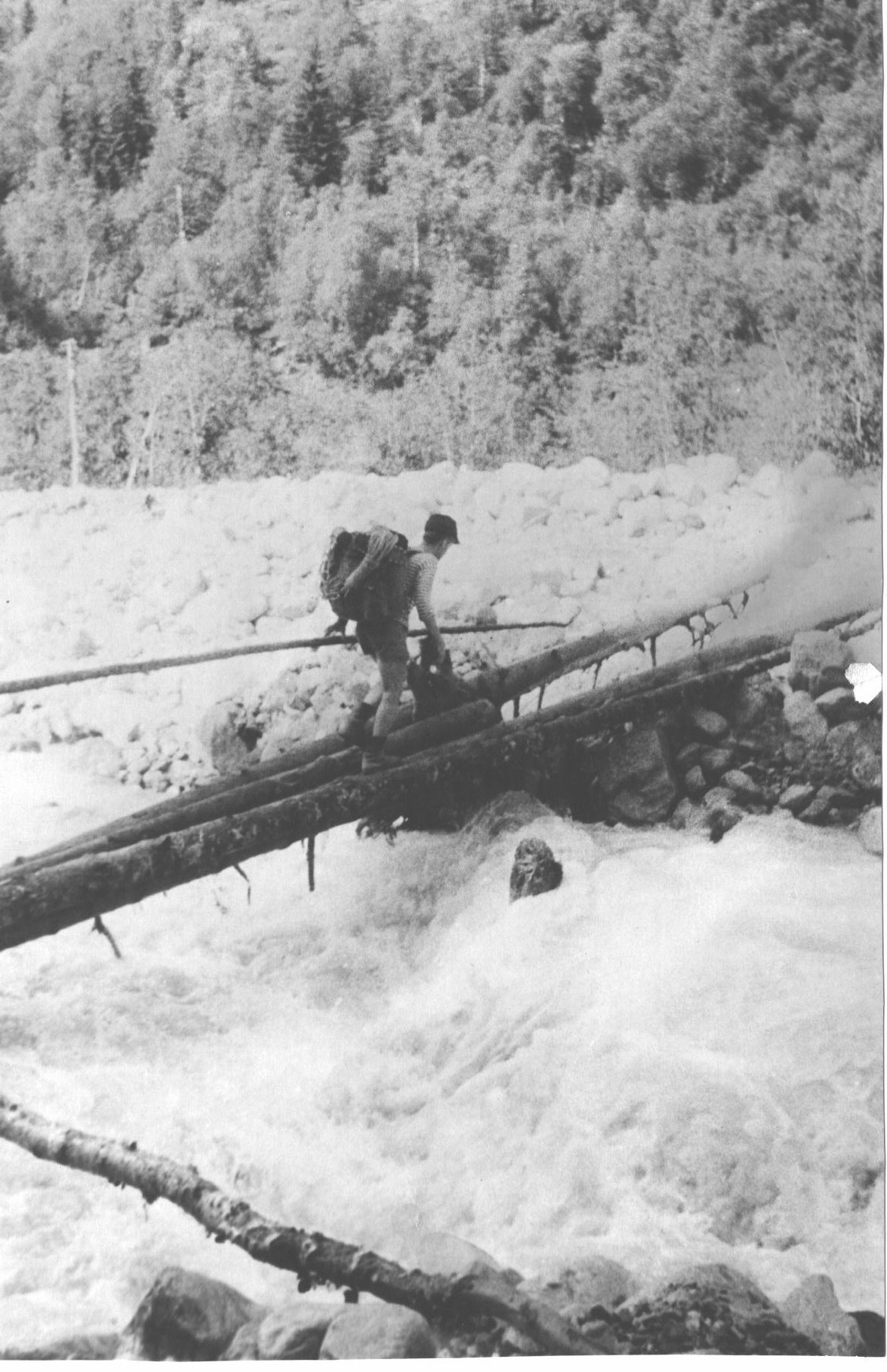 Фото